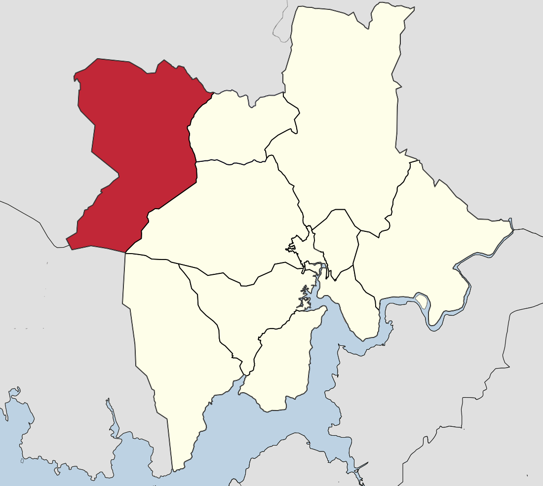 Parroquia de San Miguel de Valadares en Outes